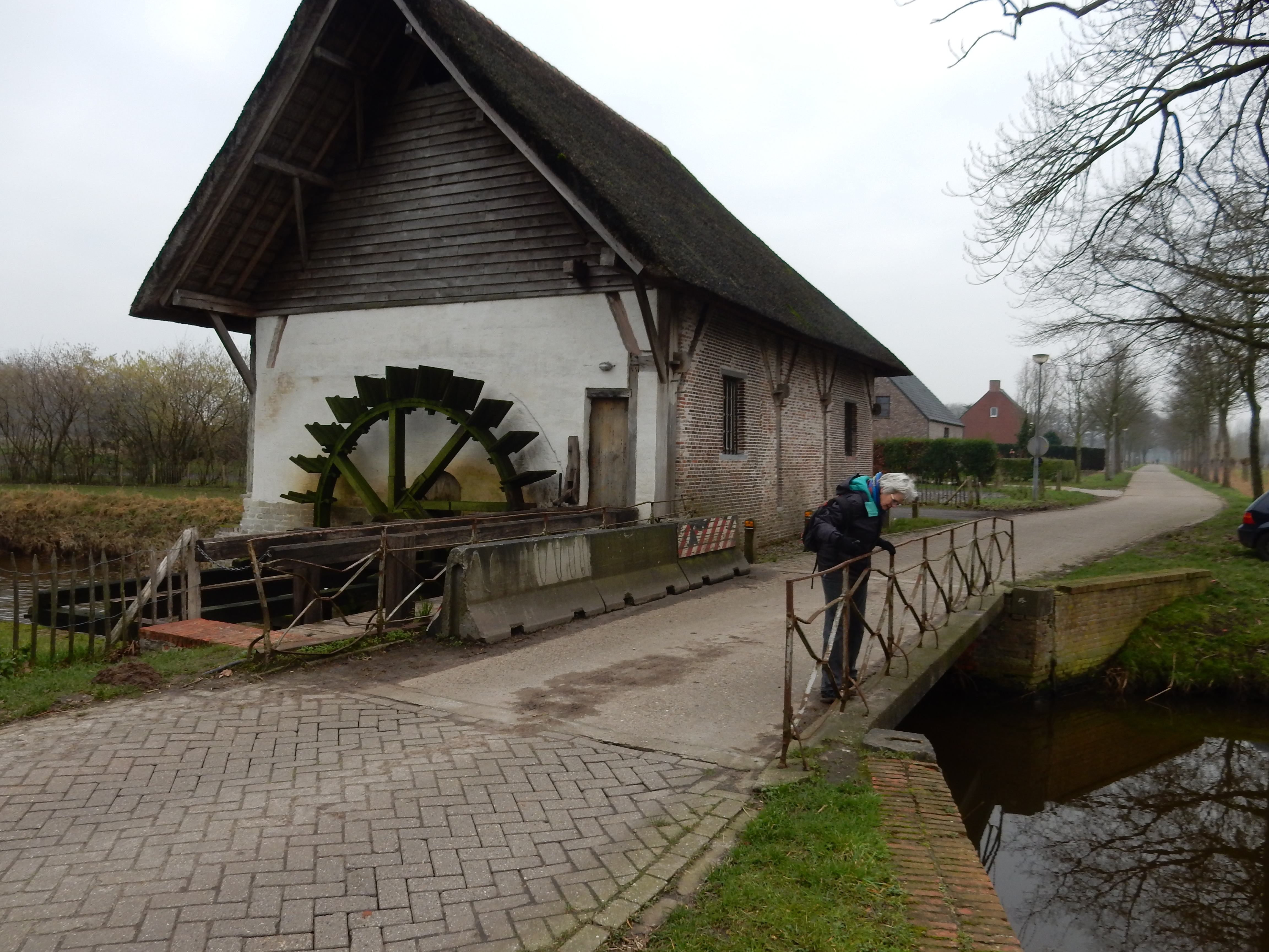 historisch